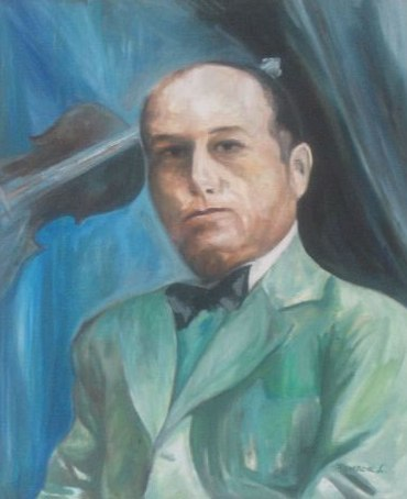 Zsolt Nándor magyar hegedűművész és zeneszerző.